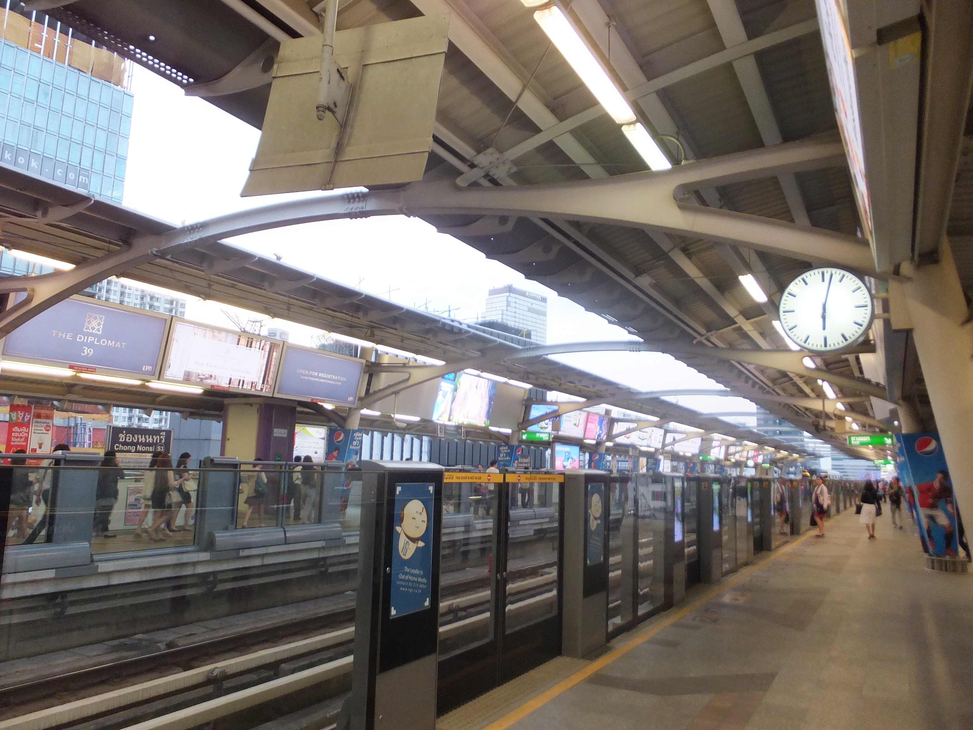 バンコクBTSチョーンノンシー駅のホーム。ホームドアが設置されている。デジタルサイネージで広告も表示。